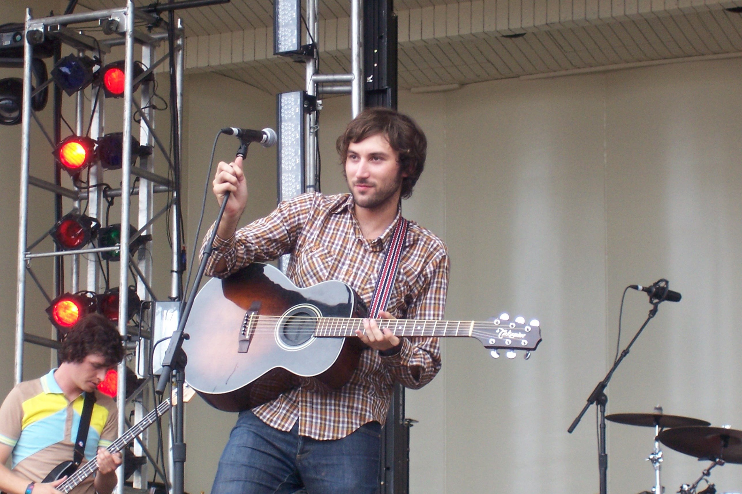 Matt Costa en concert à Lollapalooza à Chicago en 2006